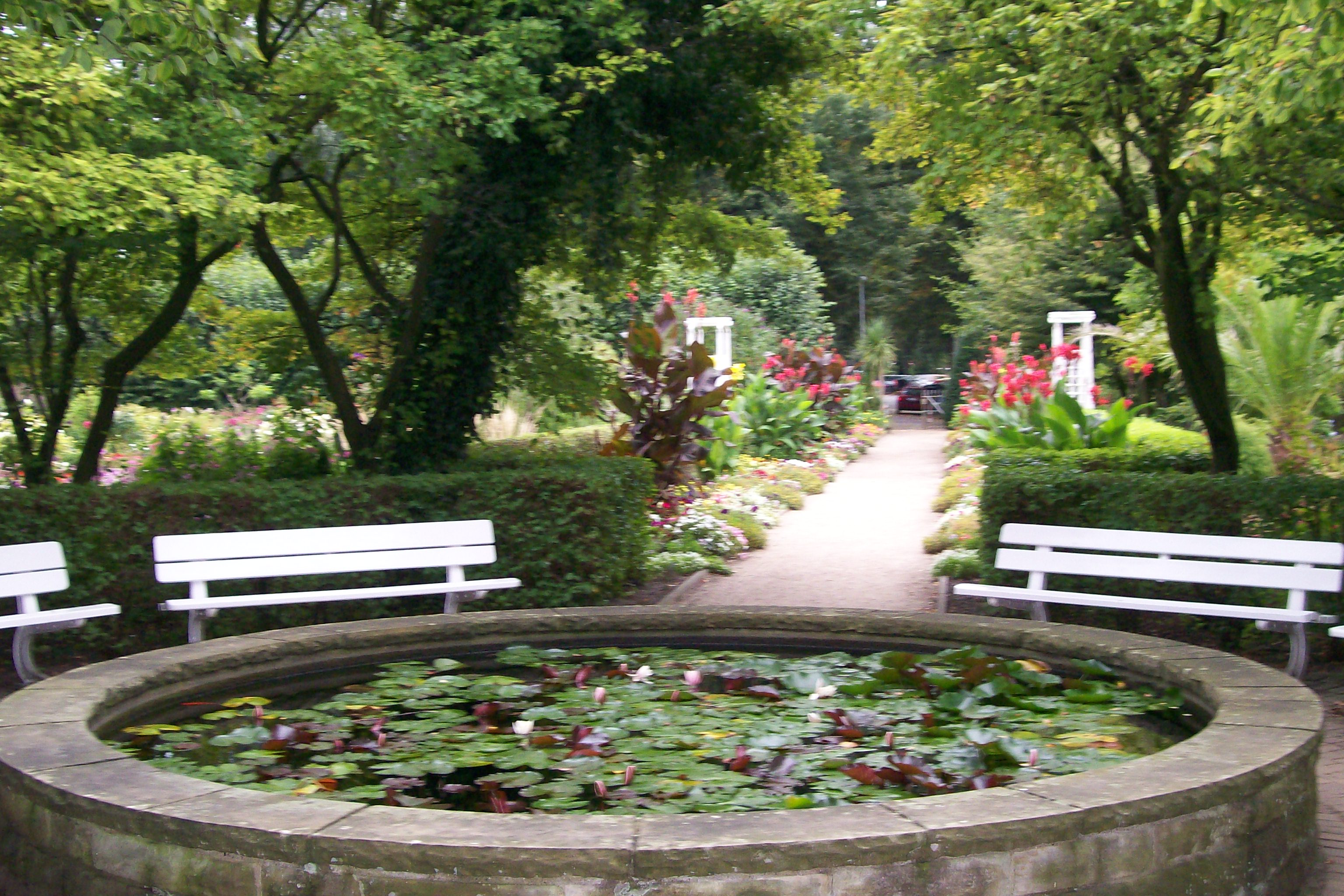 Schulgarten Lübeck in Lübeck, Germany, Teichrosenbecken